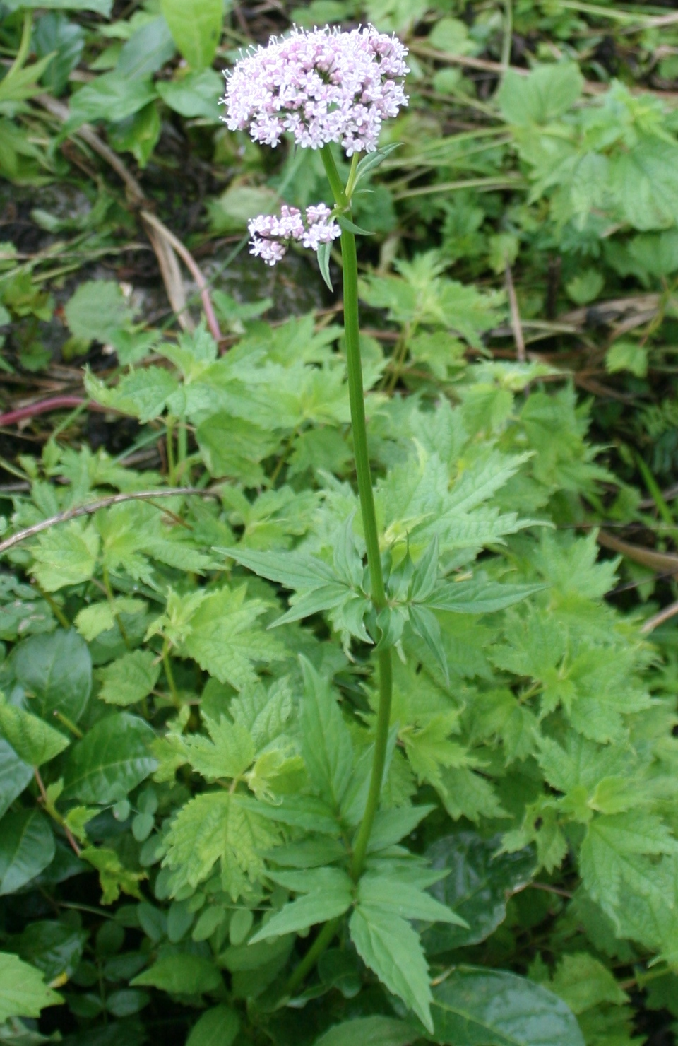 カノコソウ 伊吹山にて